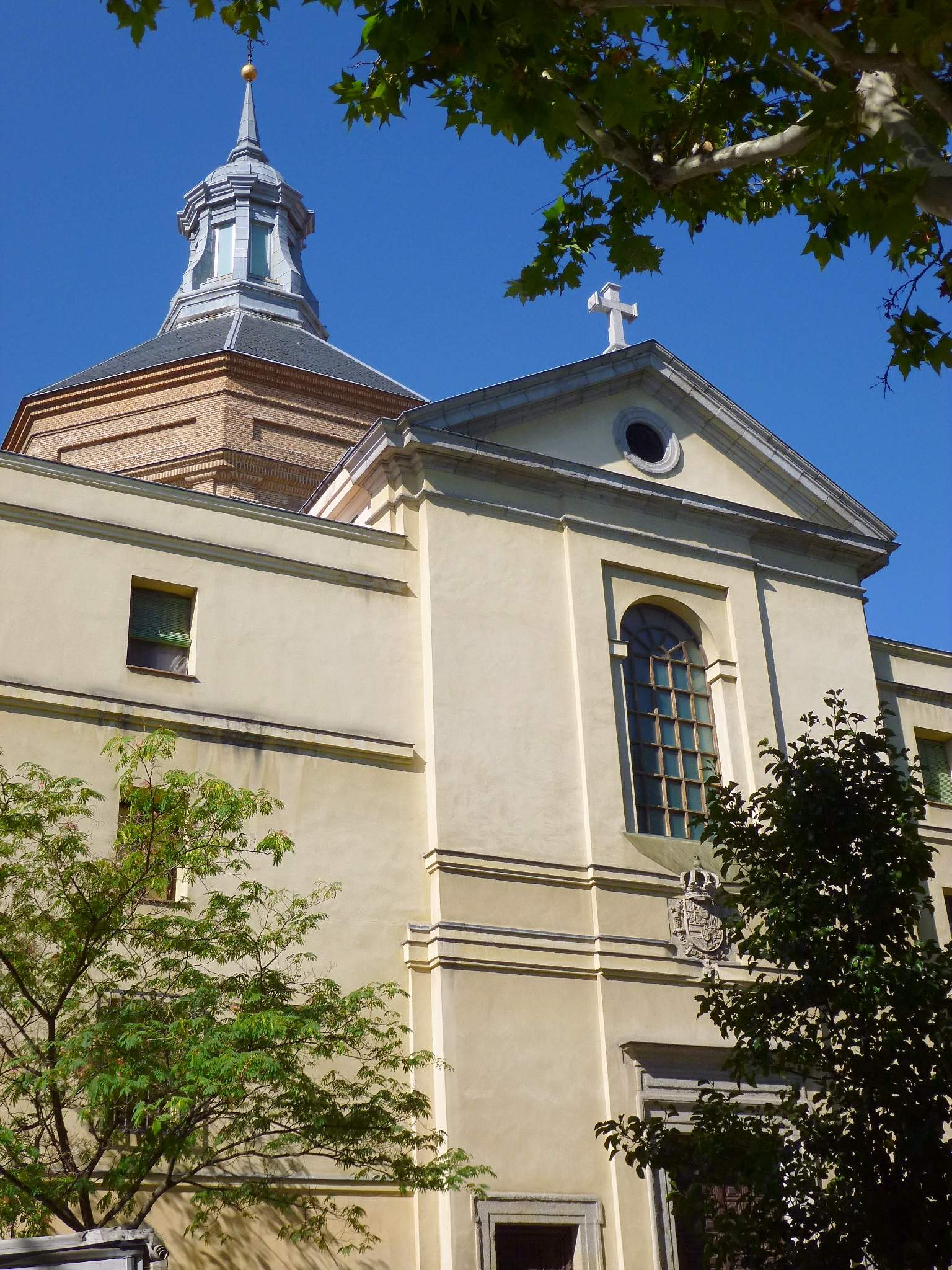 Real Monasterio de Santa Isabel (Agustinas Recoletas), en Madrid